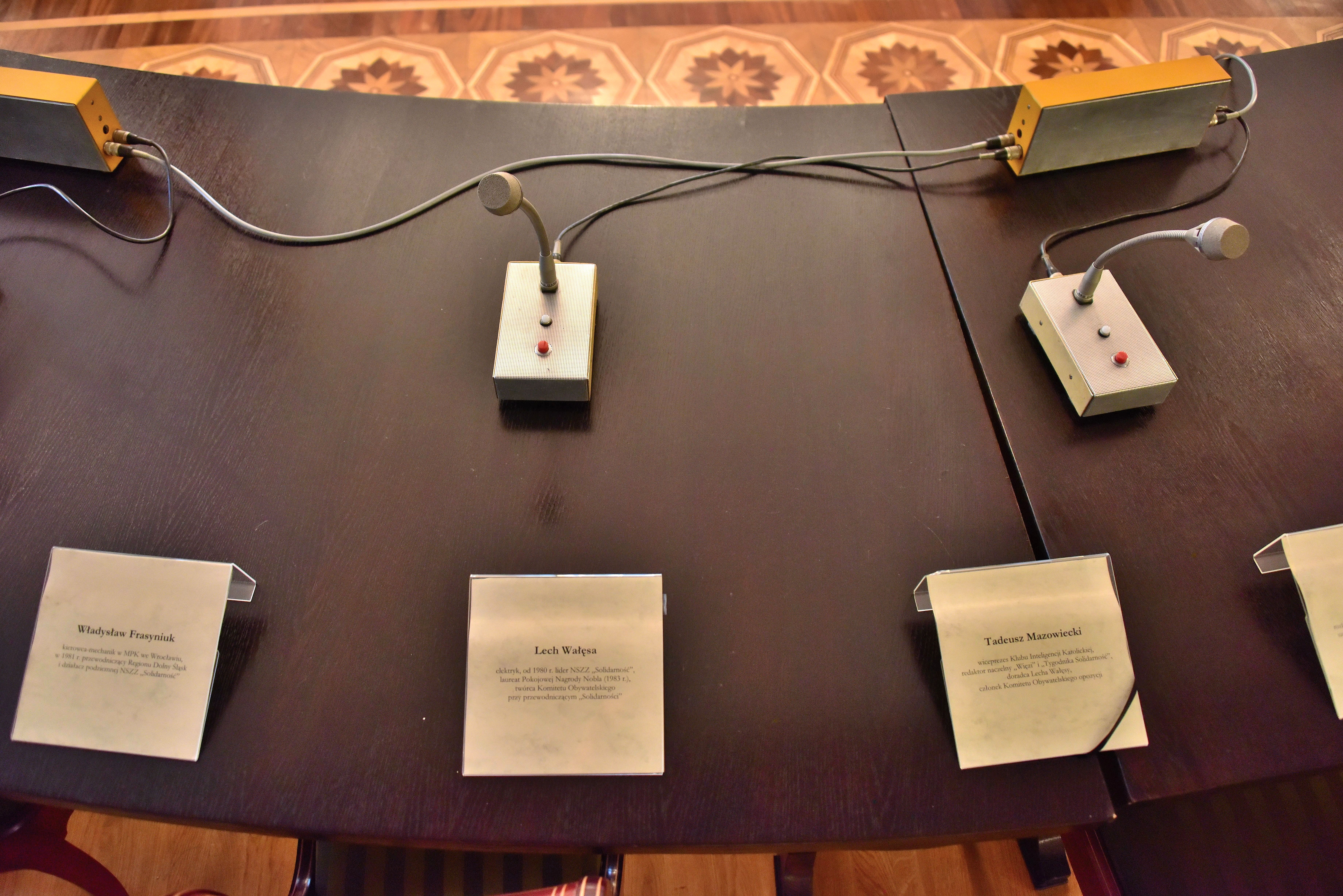 Okrągły Stół w Sali Okrągłego Stołu w Pałacu Prezydenckim w Warszawie. Tabliczki z uczestnikami obrad po stronie opozycyjnej: Władysława Frasyniuka, Lecha Wałęsy i Tadeusza Mazowieckiego